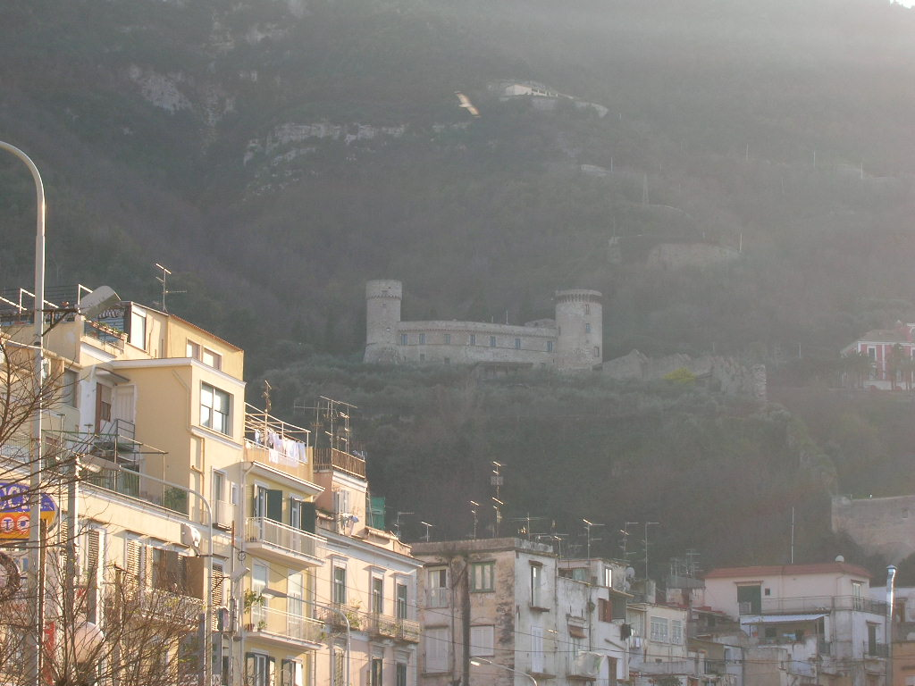 Il castello medievale di Castellammare di Stabia